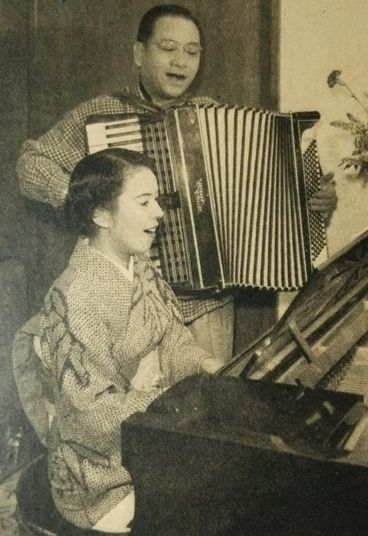 楠木繁夫・三原純子夫妻